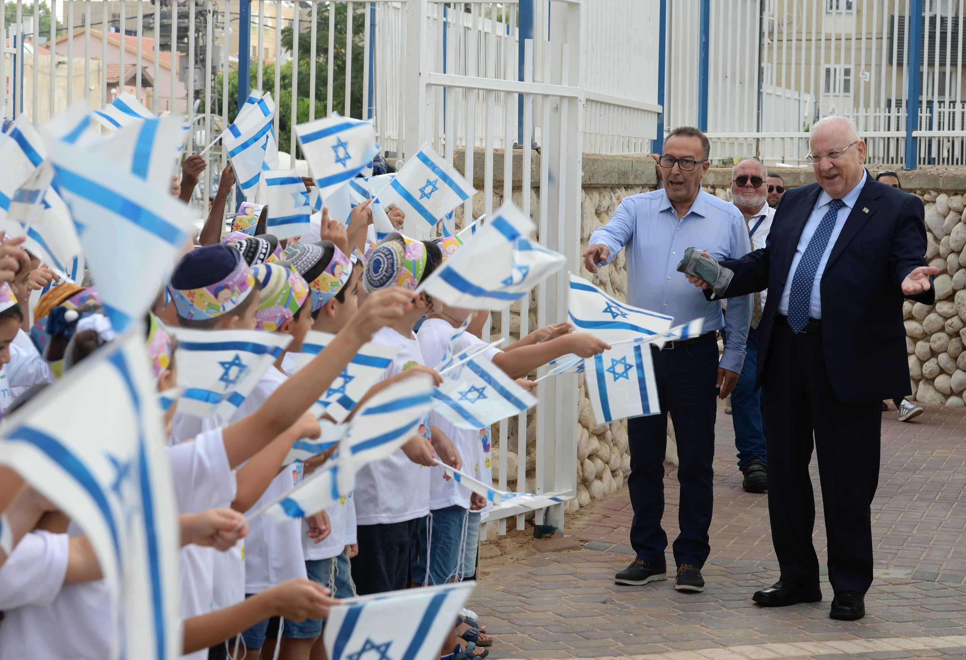 נשיא המדינה, ראובן ריבלין, פותח את שנת הלימודים התשע"ט עם ילדי כיתה א' בבית הספר הממלכתי דתי נועם אליהו בנתיבות. משמאל: ראש עיריית נתיבות, יחיאל זוהר